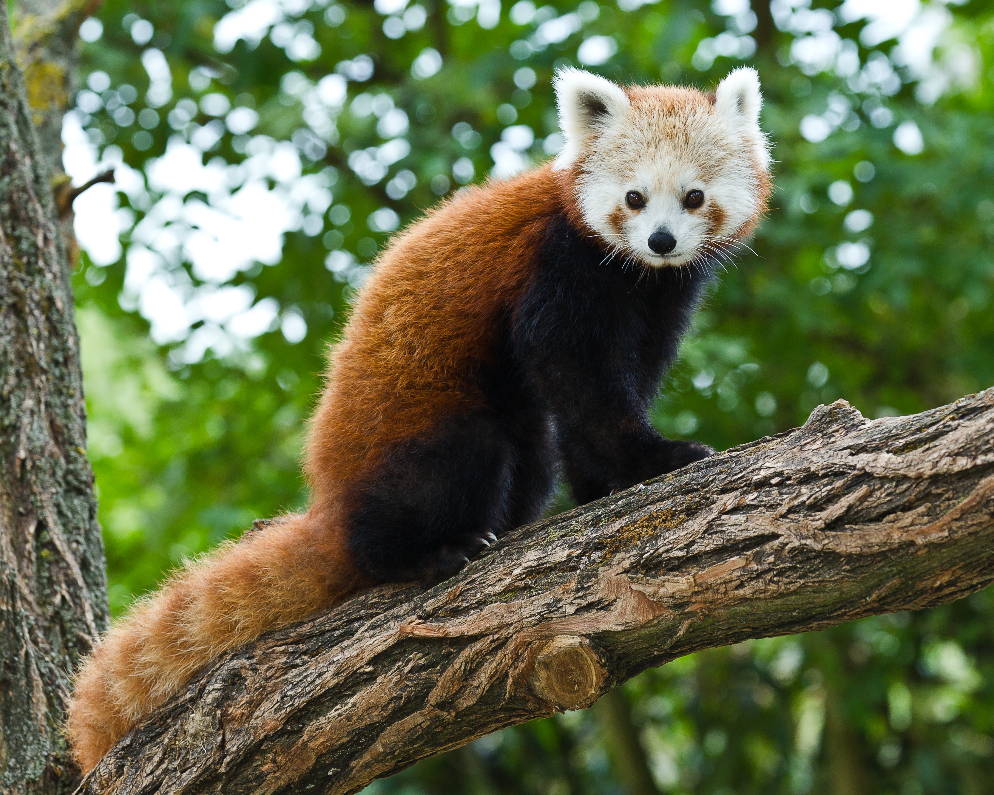 Kis panda a veszprémi állatkertben